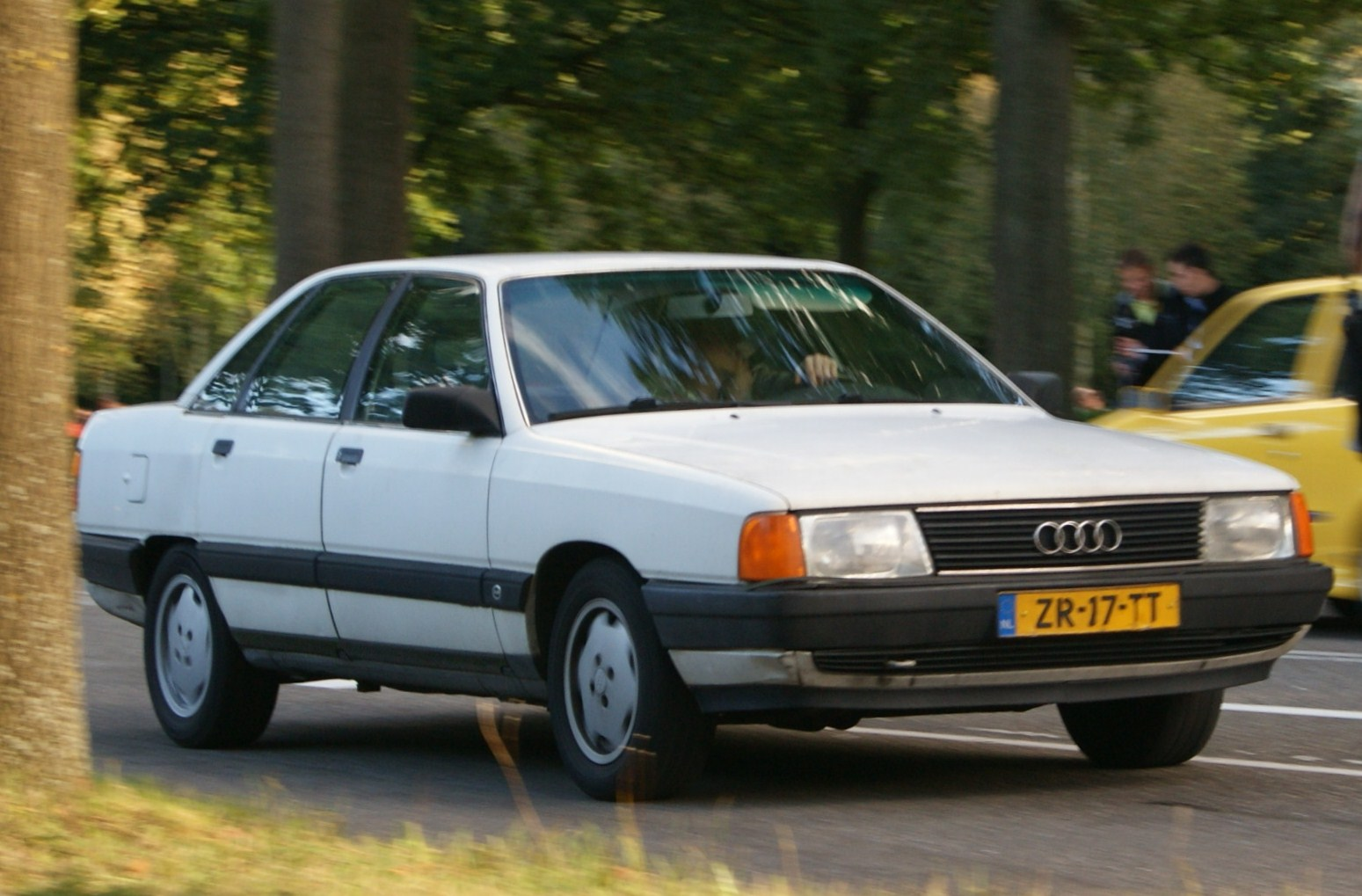 ZR-17-TT